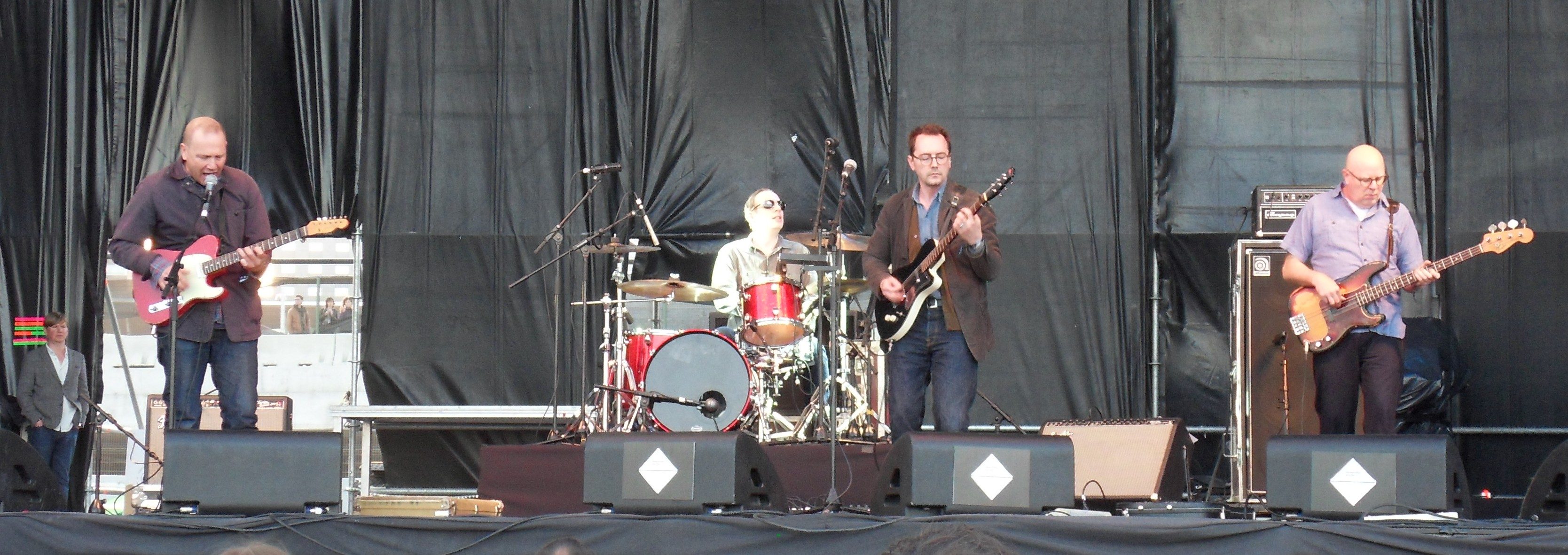 The Sea and Cake auf dem Festival Primavera Sound 2013 in Barcelona (von links nach rechts: Sam Prekop, John McEntire, Archer Prewitt, Doug McCombs (who filled in for Eric Claridge))